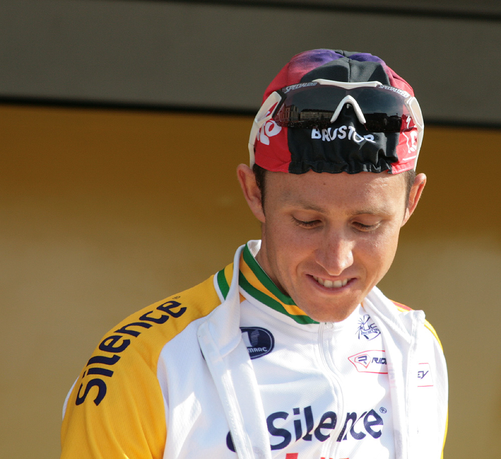 Matthew Lloyd voor de start van Luik-Bastenaken-Luik 2008